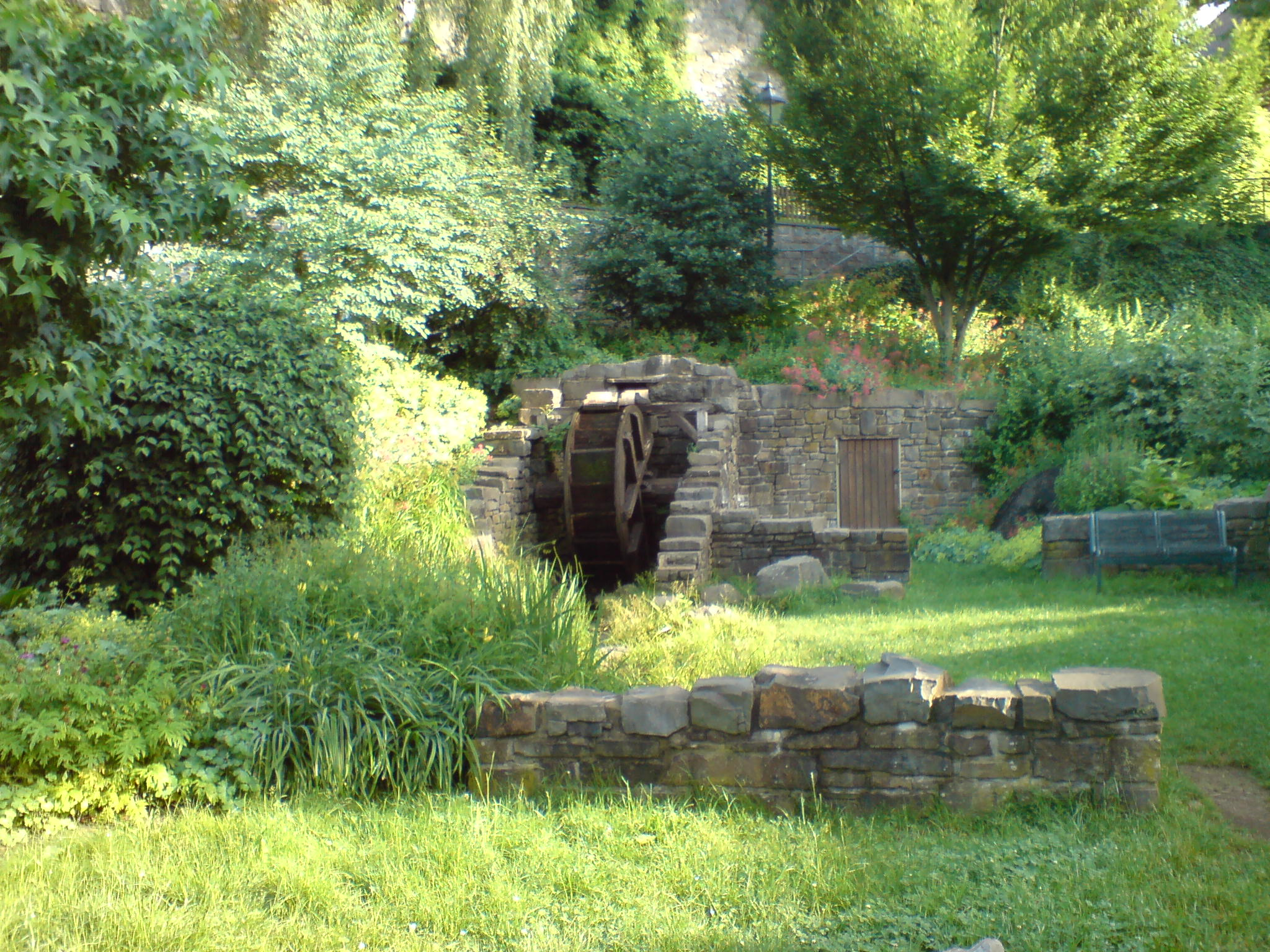 Wassermühle im Weierhohl in Olpe